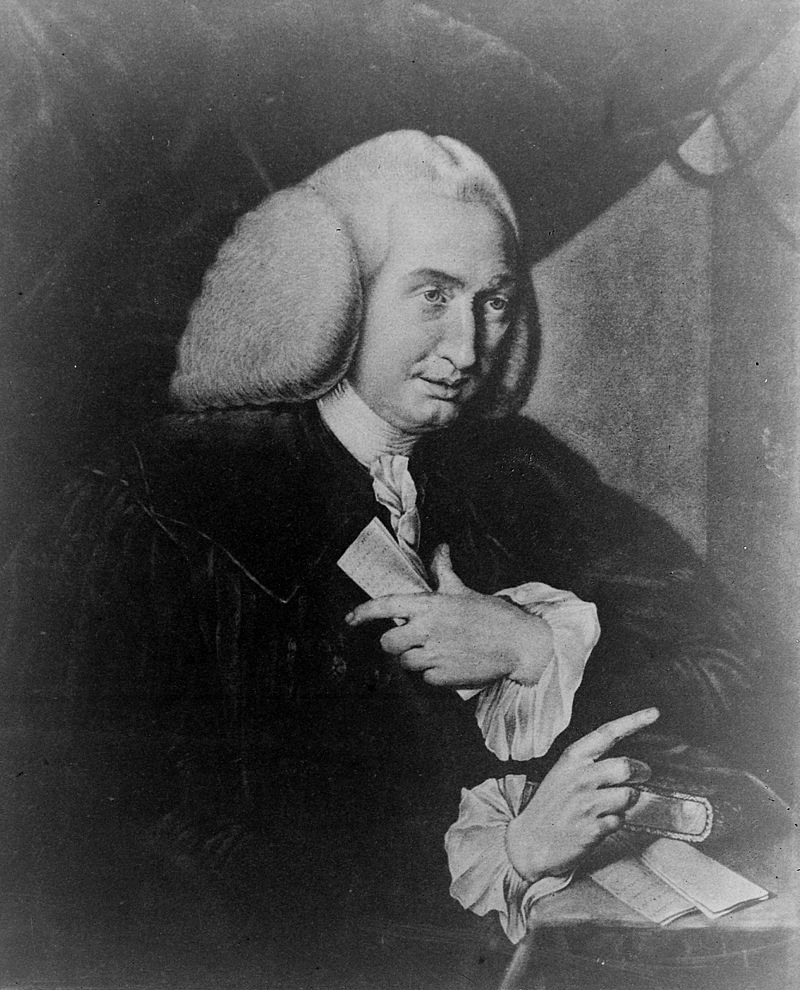 Portrait von William Cullen